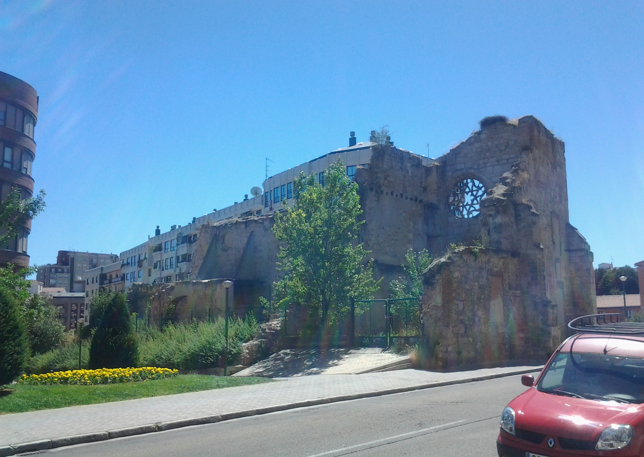 Ruinas del monasterio de San Francisco de Burgos, provincia de Burgos, (España).